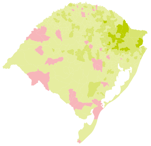 Resultados do segundo turno da eleição para governador do Rio Grande do Sul em 2014 por cidades.